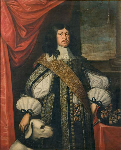 August, Herzog von Sachsen-Weißenfels, Graf von Barby, Administrator des Erzstifts Magdeburg